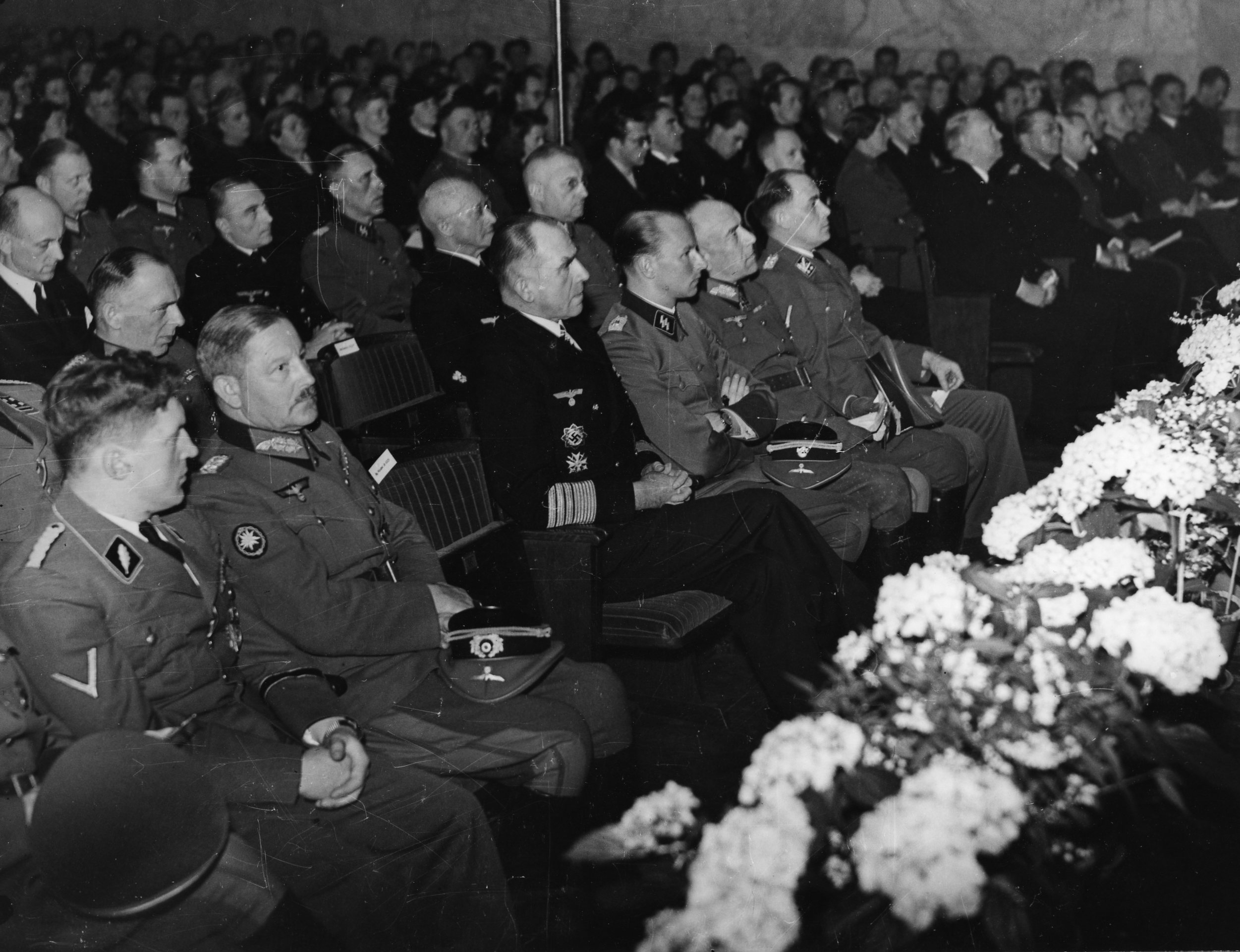 Møte i Universitetets aula. 1943/03/21. RA/PA- 1209/Ue 90/ img013 Nasjonal Samling, forkortet NS, var et norsk politisk parti som ble grunnlagt av Vidkun Quisling i 1933 og ble oppløst ved frigjøringa i 1945. Ideologisk fulgte partiet den tyske nasjonalsosialismen, og NS ble støtteorganisasjon for den tyske okkupasjonsmakta i Norge under andre verdenskrig.